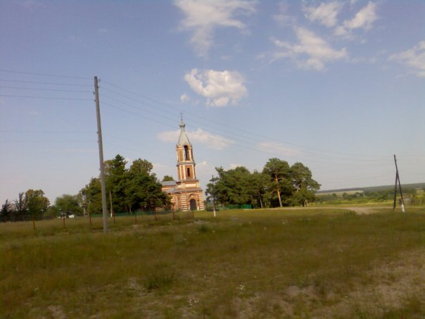 Церковь в Ибердусе 2009